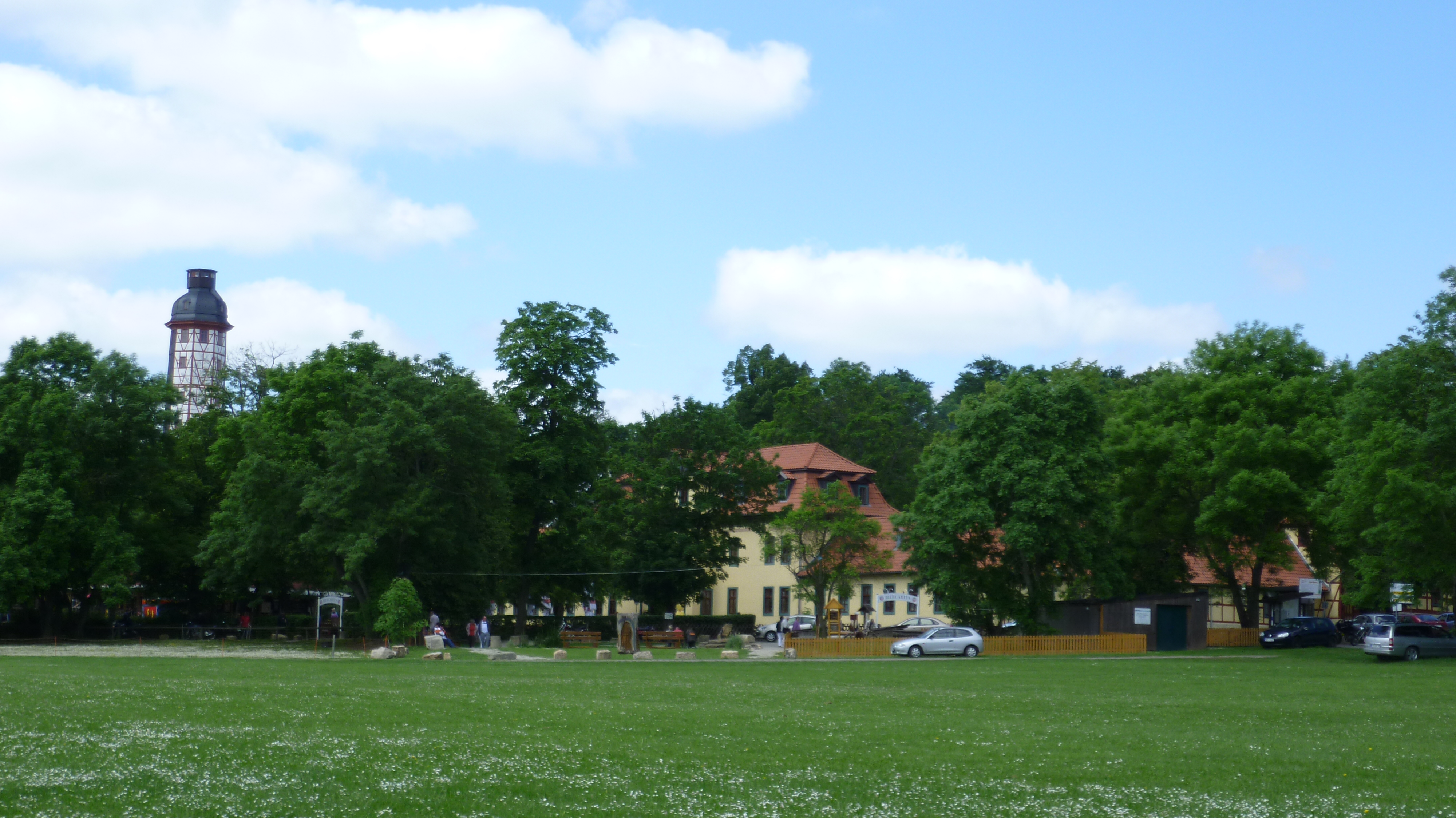 Possen bei Sondershausen mit Blick auf das Jagdschloss und den Possenturm von Südosten